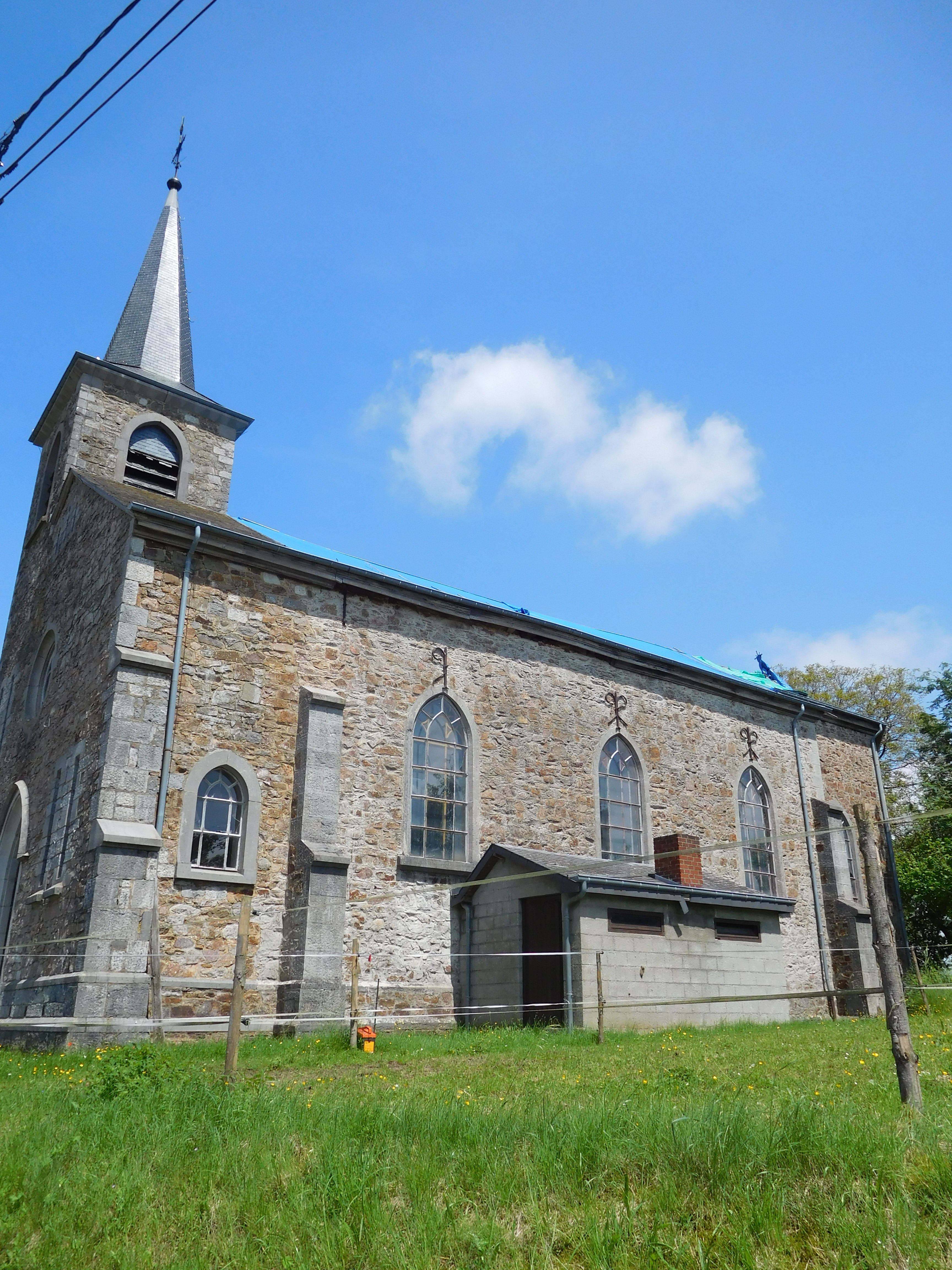 L'église (ou chapelle) Saint-Marcoul se trouve au centre du hameau de Fays-Famennequi dépend de Sohier, en Belgique